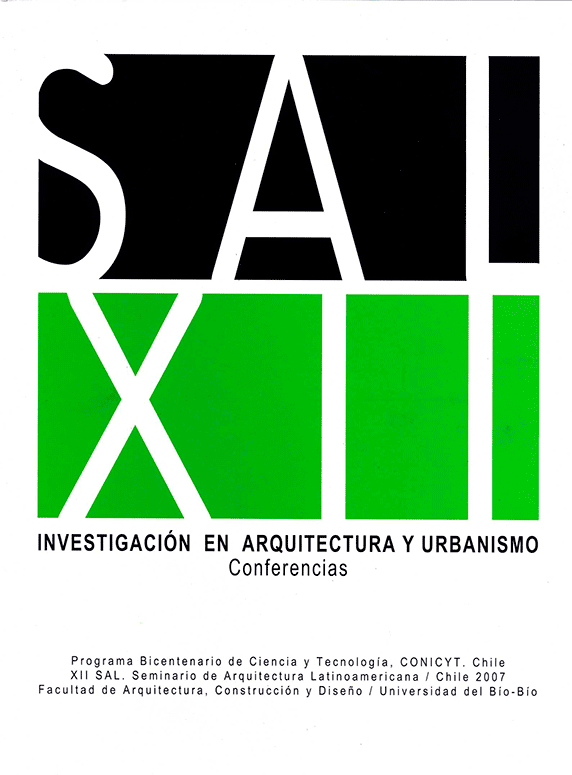 Afiche del Seminario de Arquitectura Latinoamericana XII, realizado en la ciudad de Concepción, en Chile